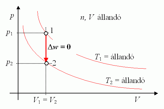 Az izochor állapotváltozás értelmezése